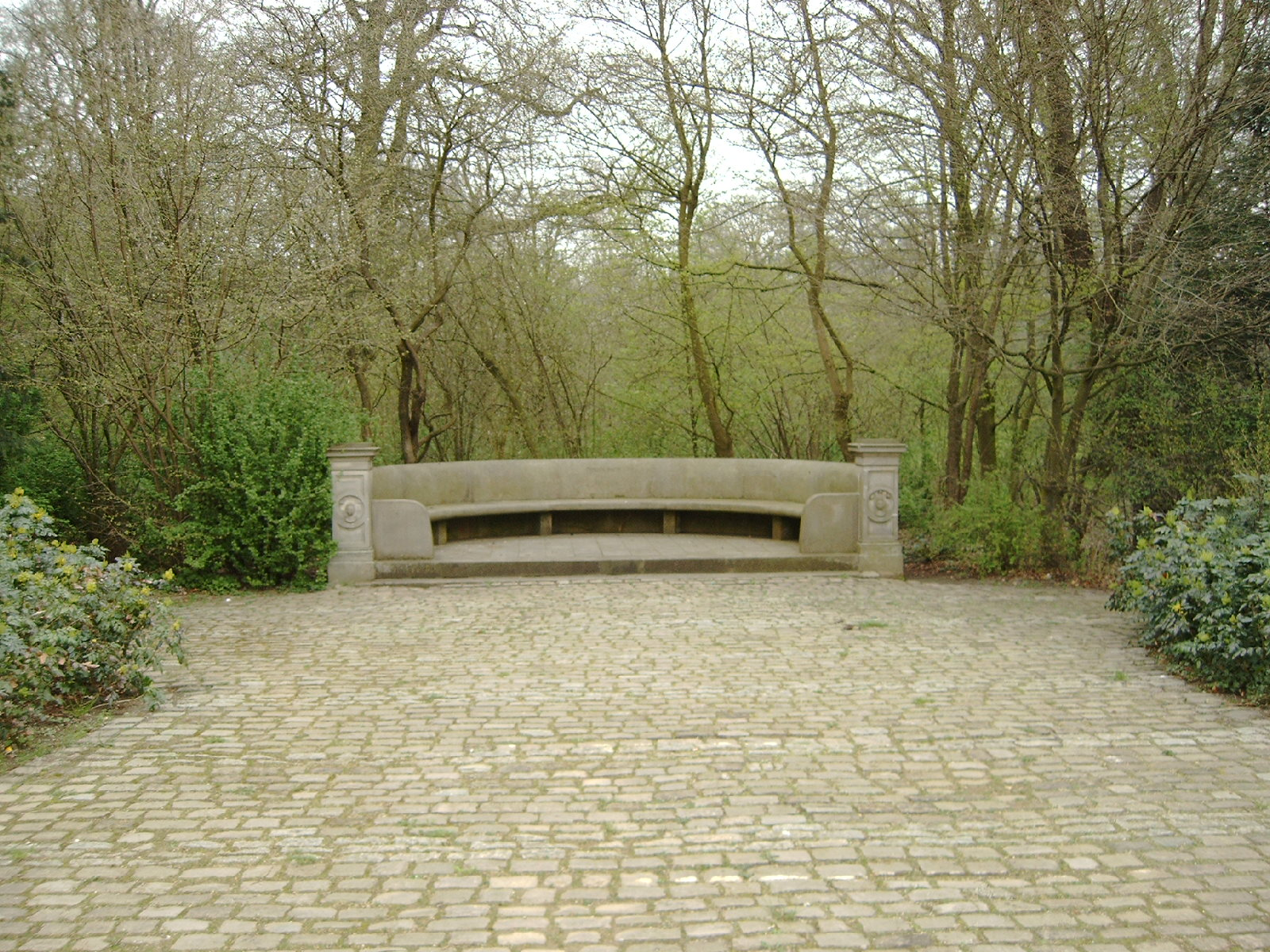 Hollerbank Halbrunde Sandsteinbank nach dem Entwurf der Architekten Müller und Runge gebaut, zur Erinnerung an den Mitbegründer des Bürgerparks und großen Stifters Hermann Holler. Aufgestellt 1869 am Marcusbrunnen. Das abgebildete Objekt ist ein geschütztes Kulturdenkmal in der Freien Hansestadt Bremen, mit der Nr. 0218,T037 beim Landesamt für Denkmalpflege registriert.